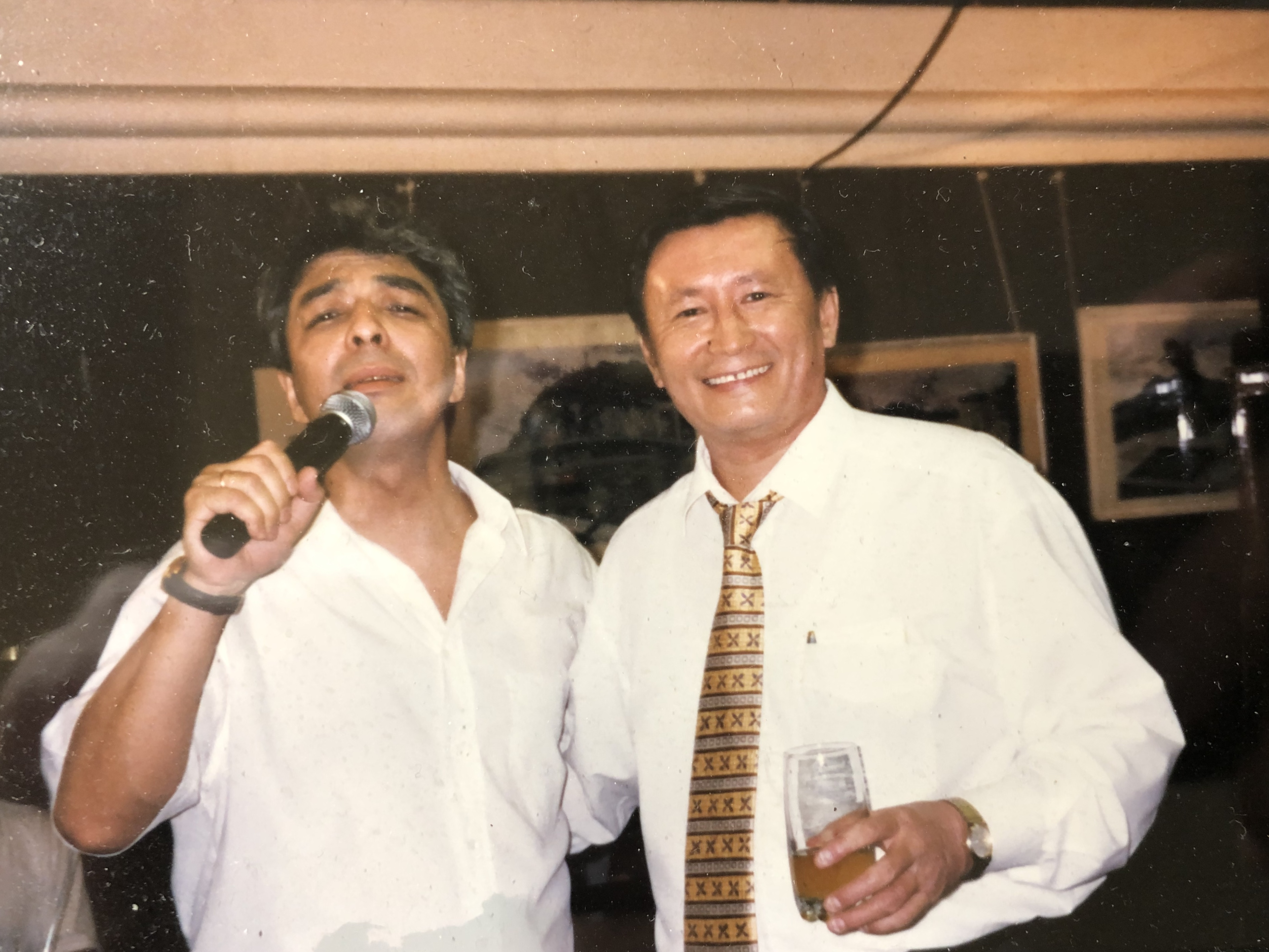 50-ти летний юбилей О. Рымжанова